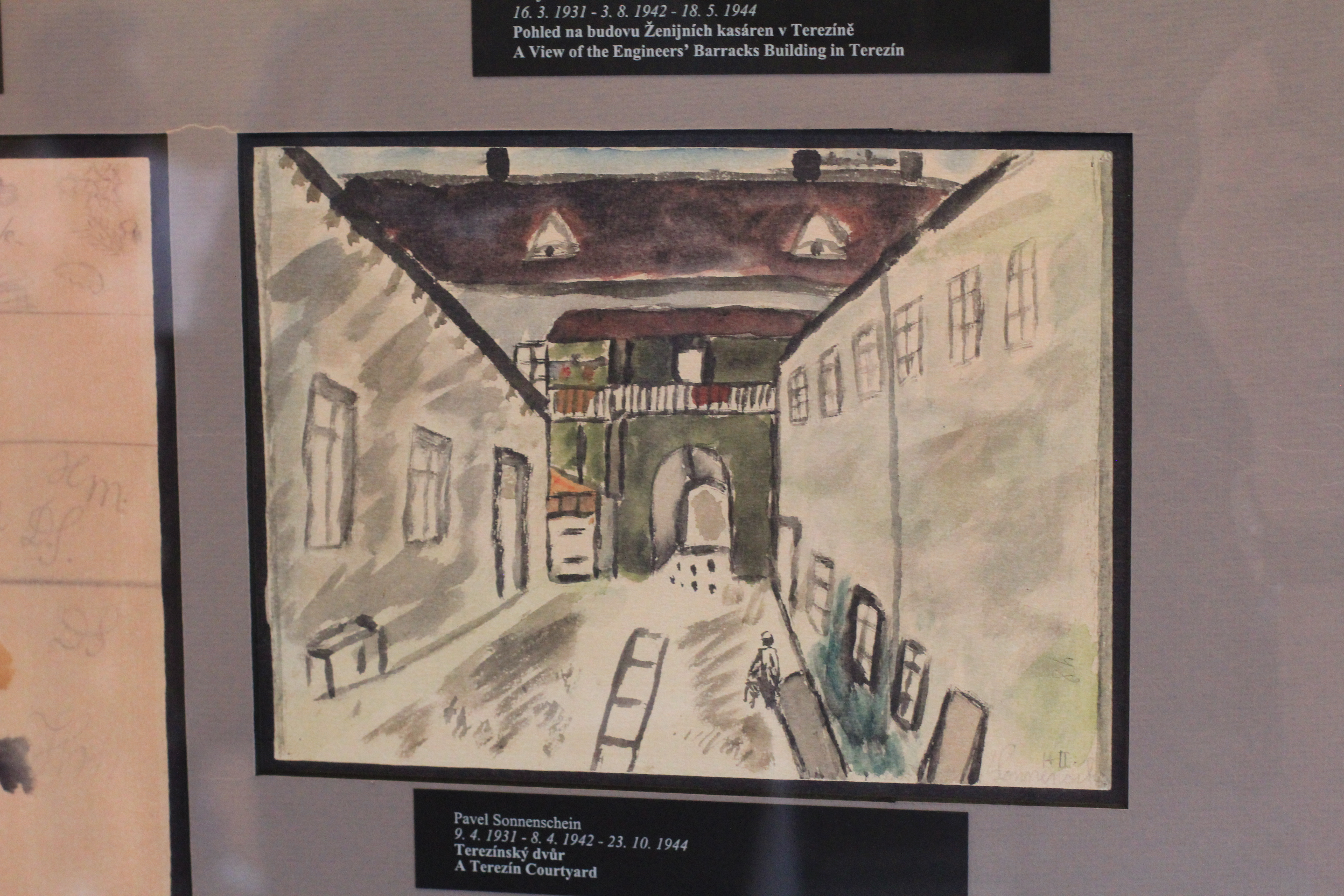 Barnetegning i Terezin.